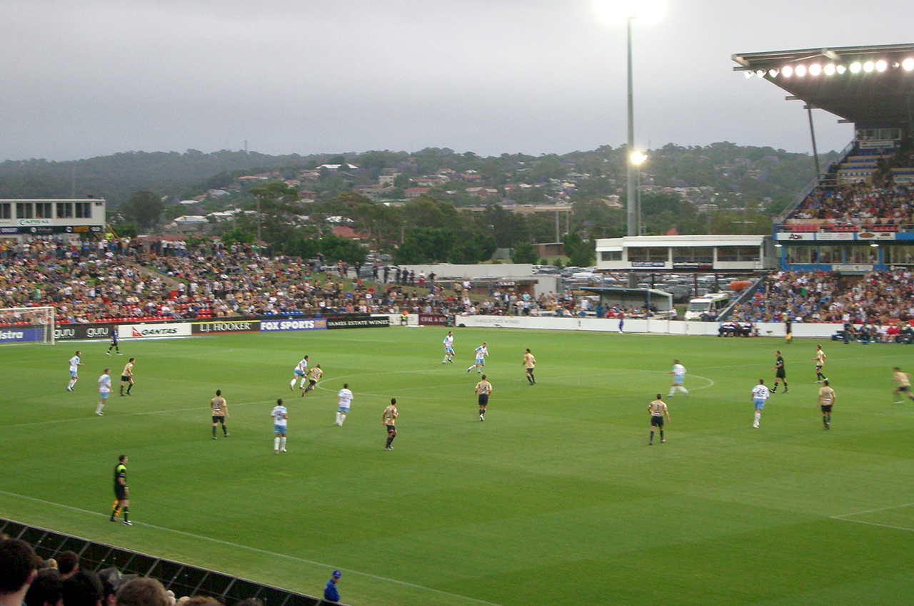 Imagen tomada durante el año 2007 en Newcastle (Australia).